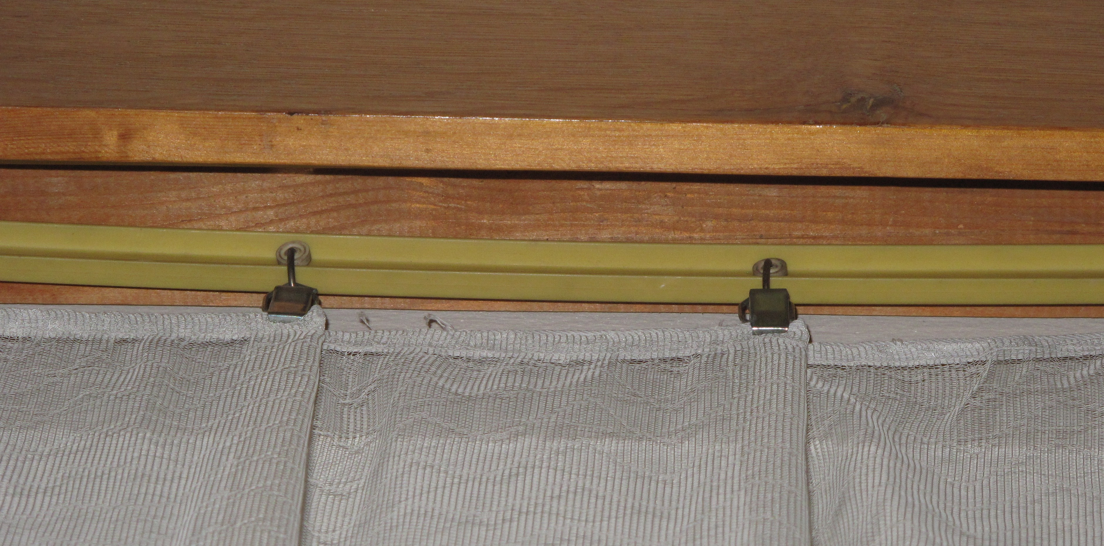 Česky: Záclona na žabce.